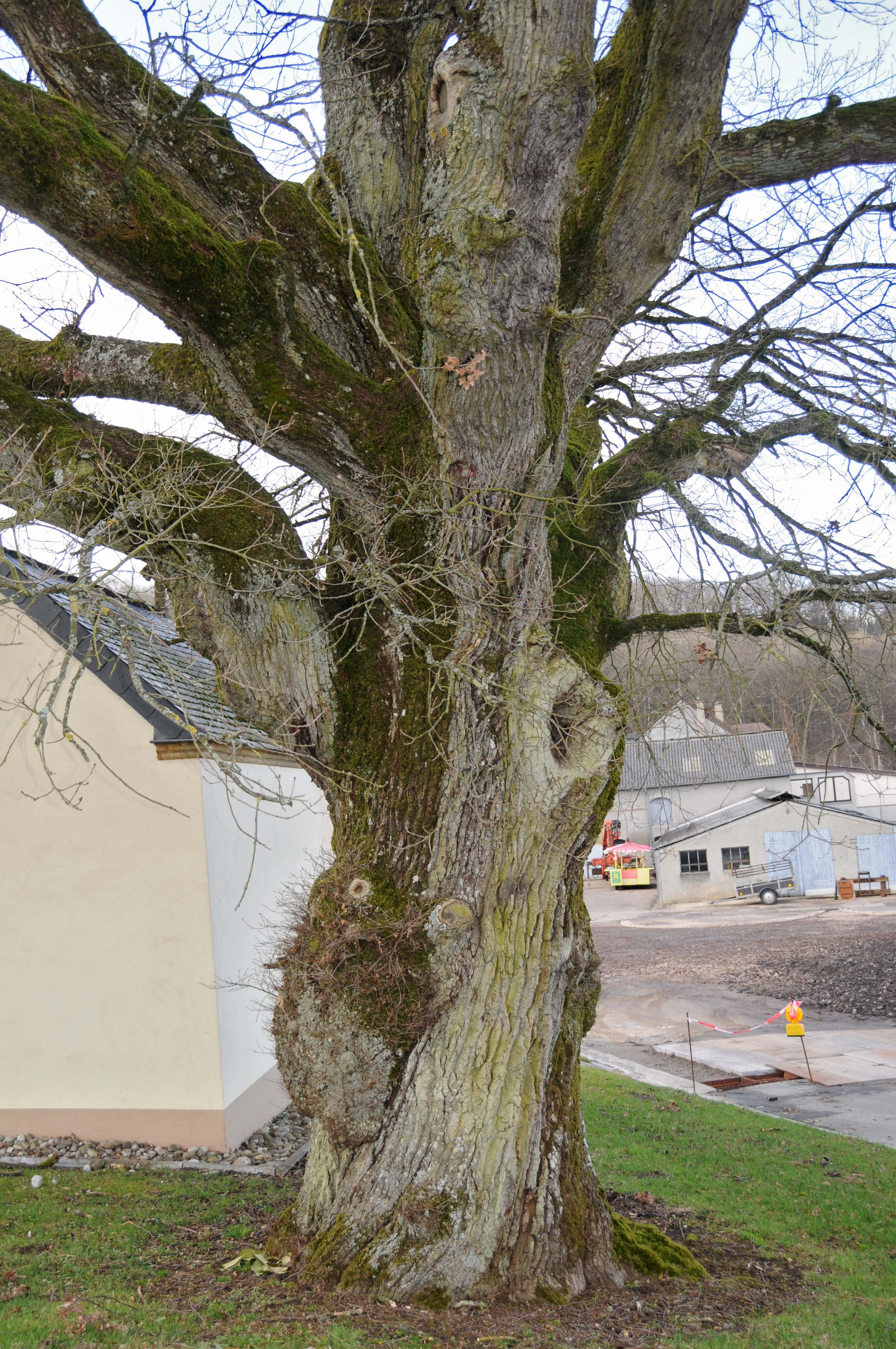 Eech um Engelshaff.